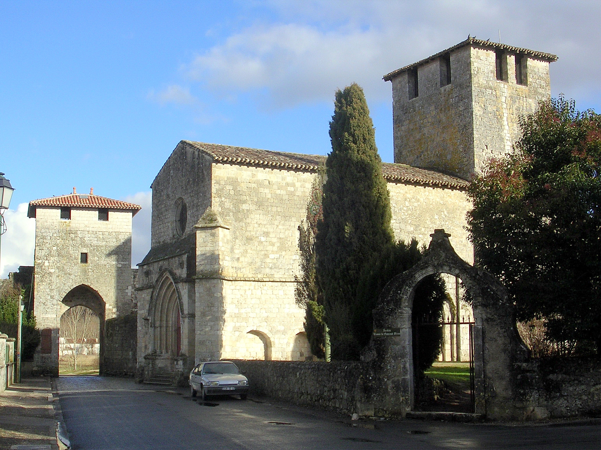 Vianne, l'église et une des portes de la ville bastide (Lot-et-Garonne, France)